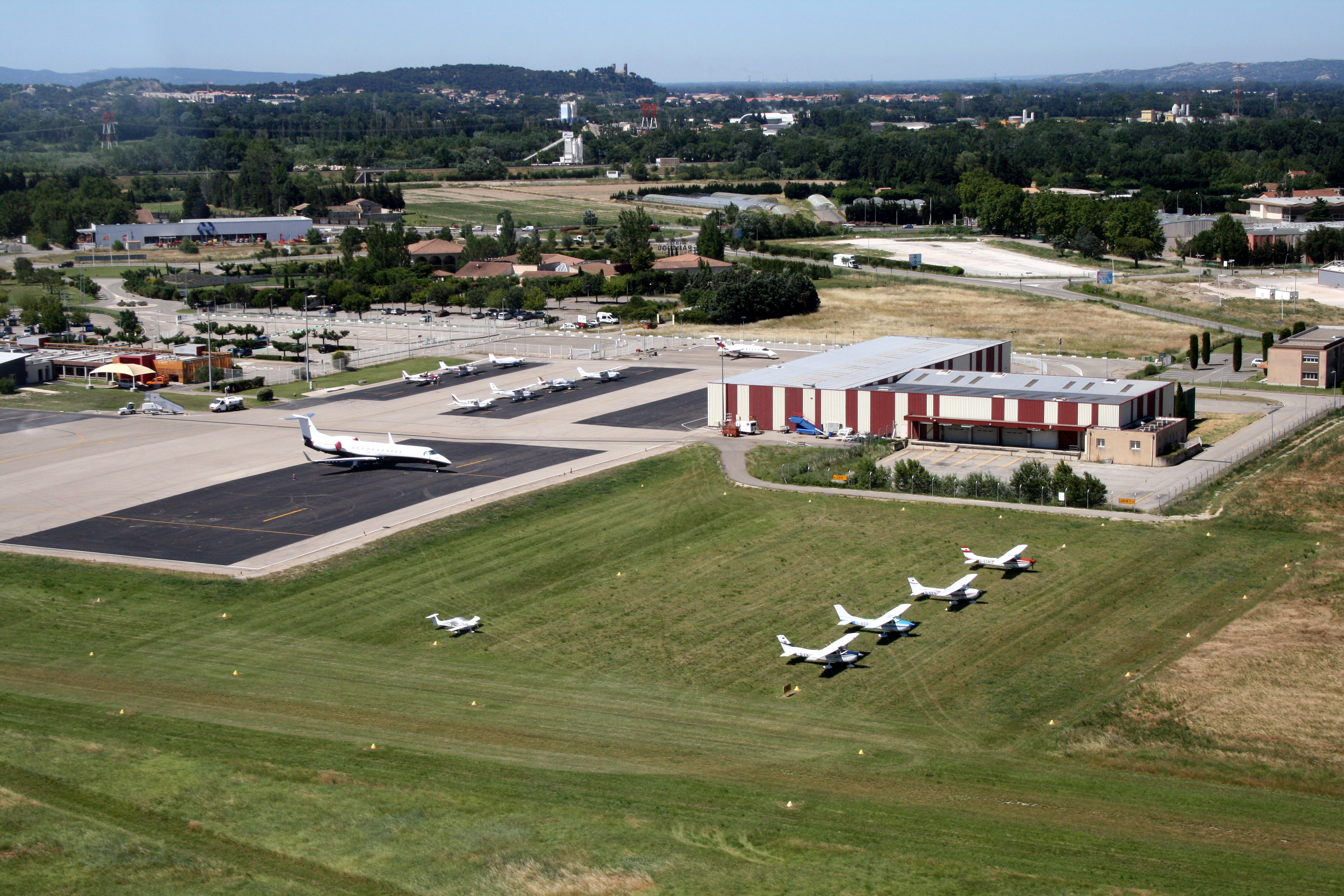 aéroport d'Avignon (AVIGNON,FR84)